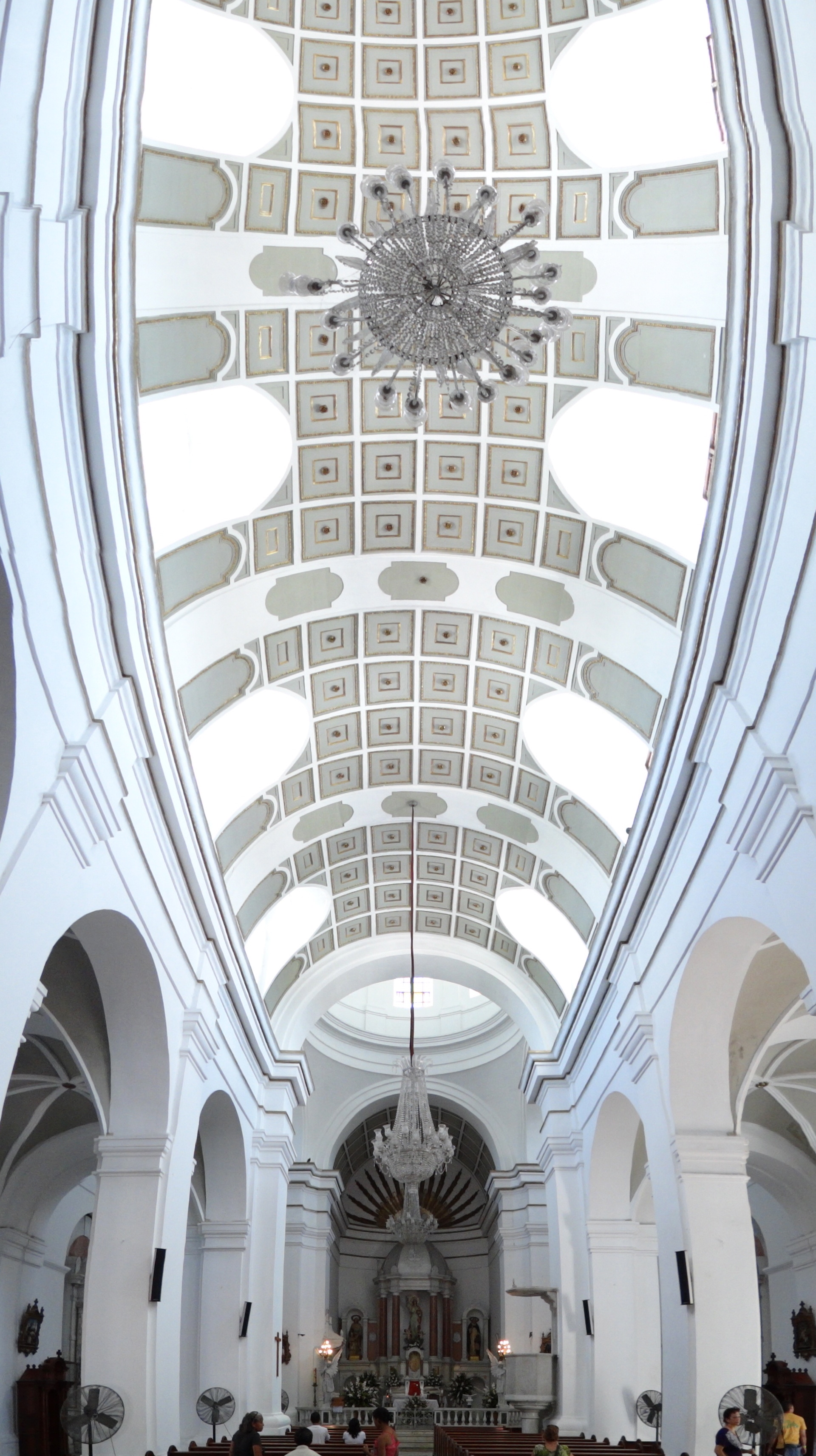 Sector Antiguo de la ciudad de Santa Marta: vista panorámica vertical del altar y el techo .